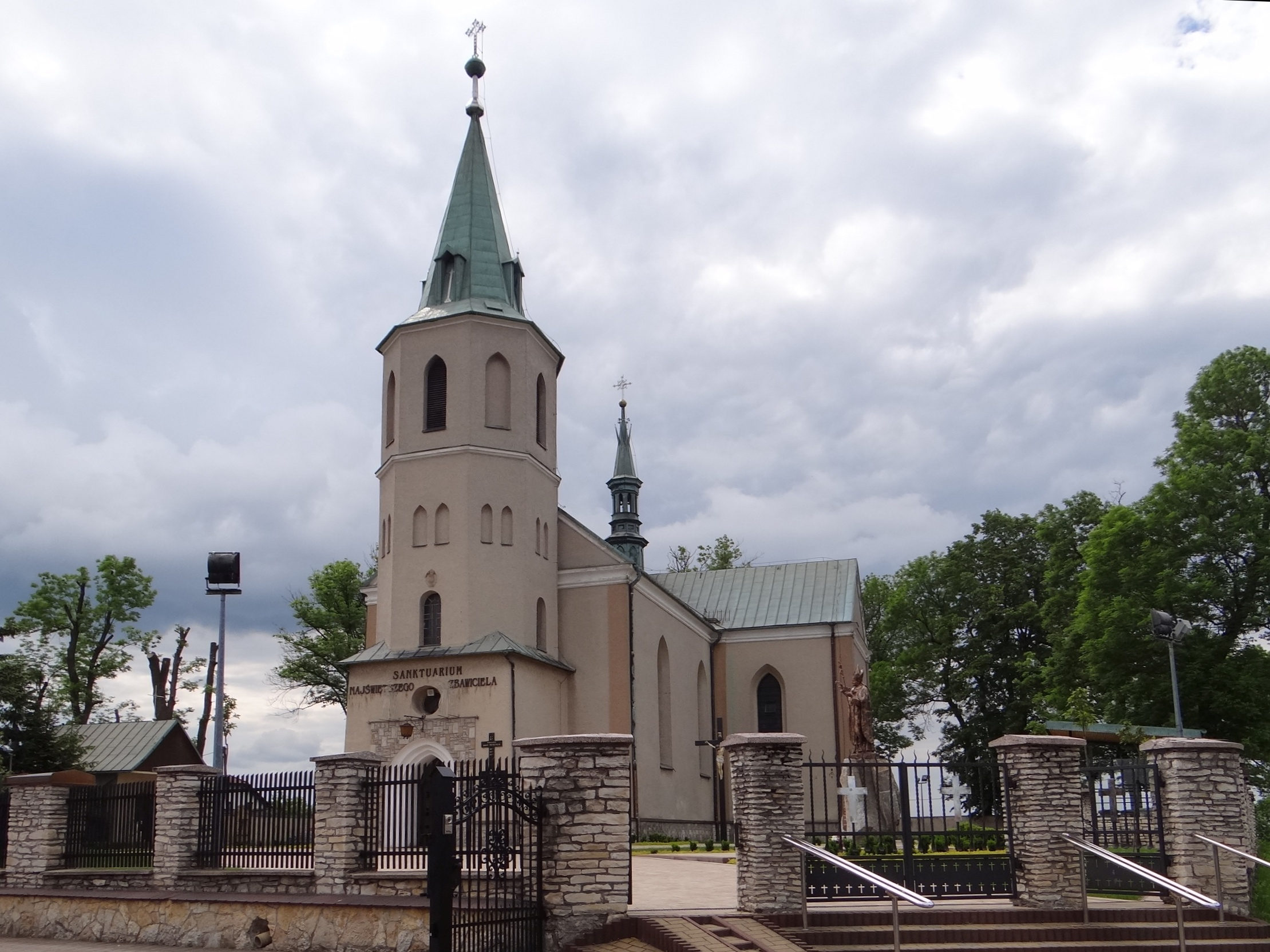 Kościół w Przegini